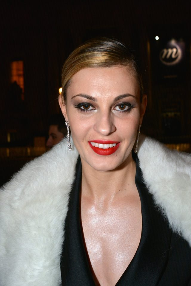 Sveva Alviti au dîner des révélations des César du cinéma